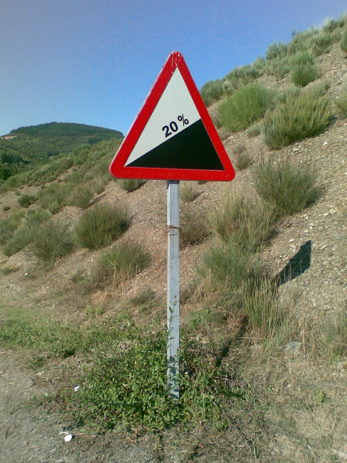 Señal de peligro de carretera de alto porcentaje. Imagen tomada en el ayuntamiento de As Nogais, provincia de Lugo, España.